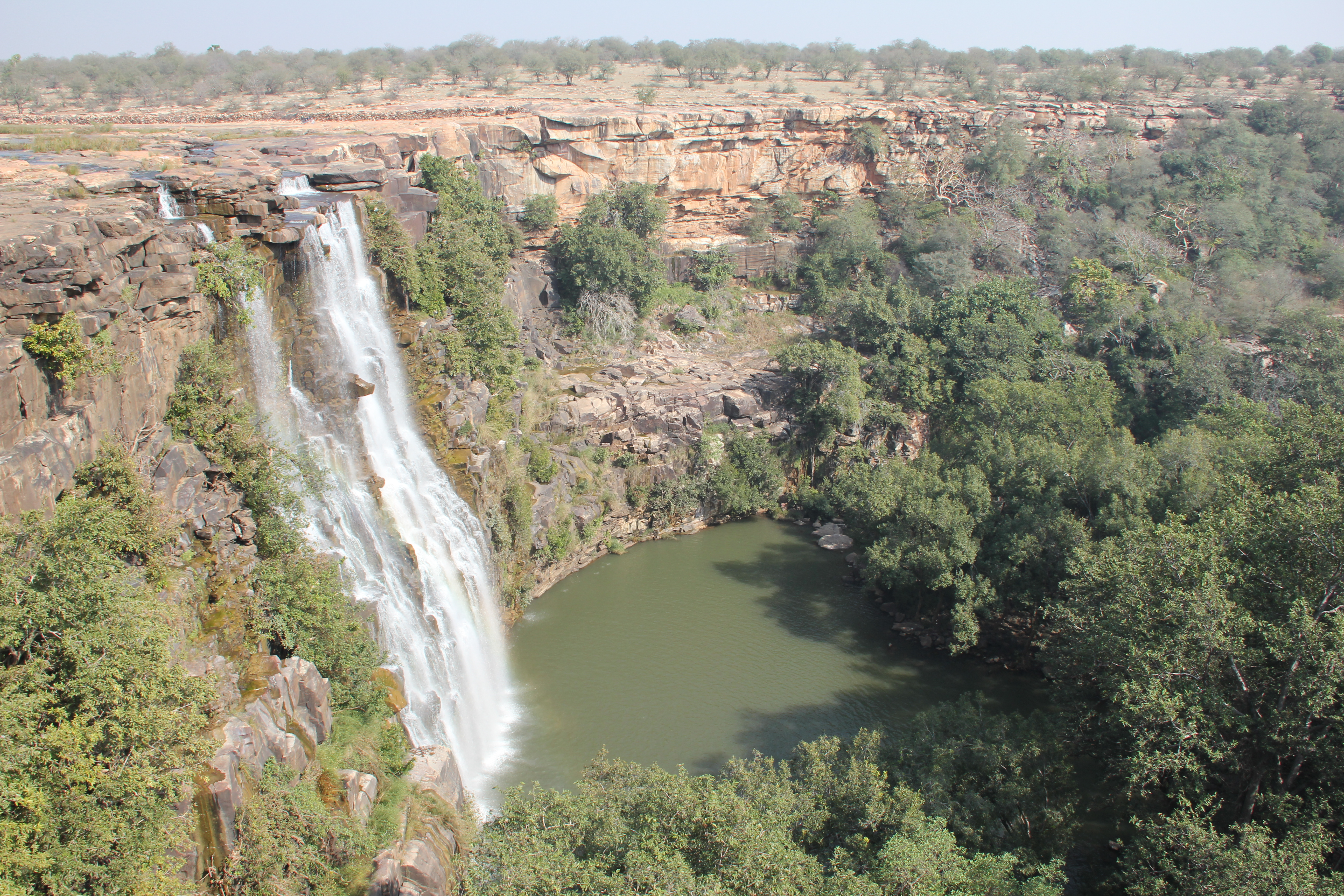 Bundi, Rajasthan, India Waterfalls